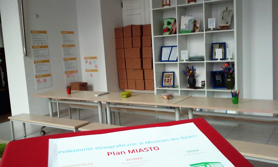 Sala Moja Książka - Muzeum dla Dzieci ( w Państwowym Muzeum Etnograficznym w Warszawie)